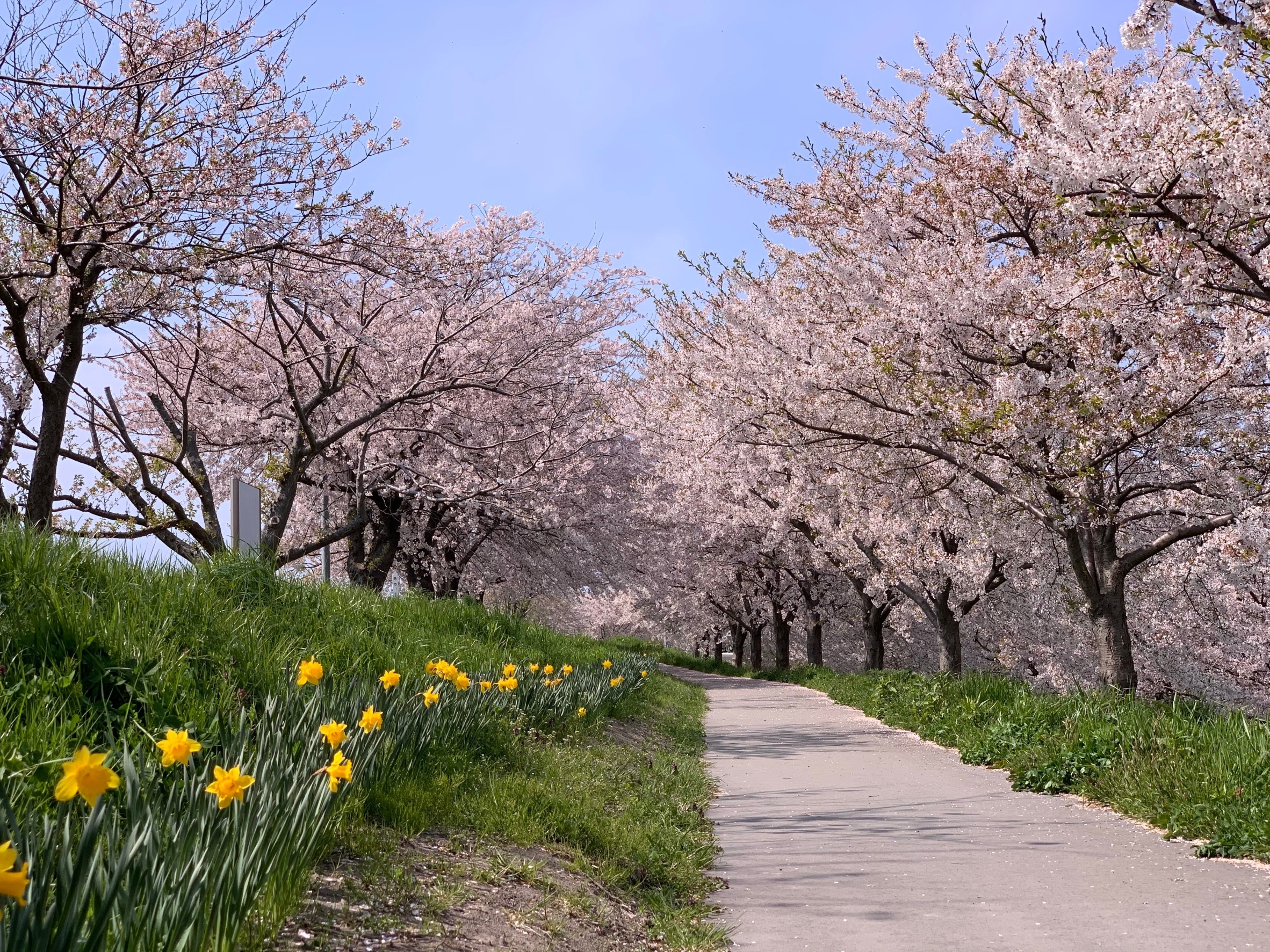 大河津分水の桜（2020年4月）